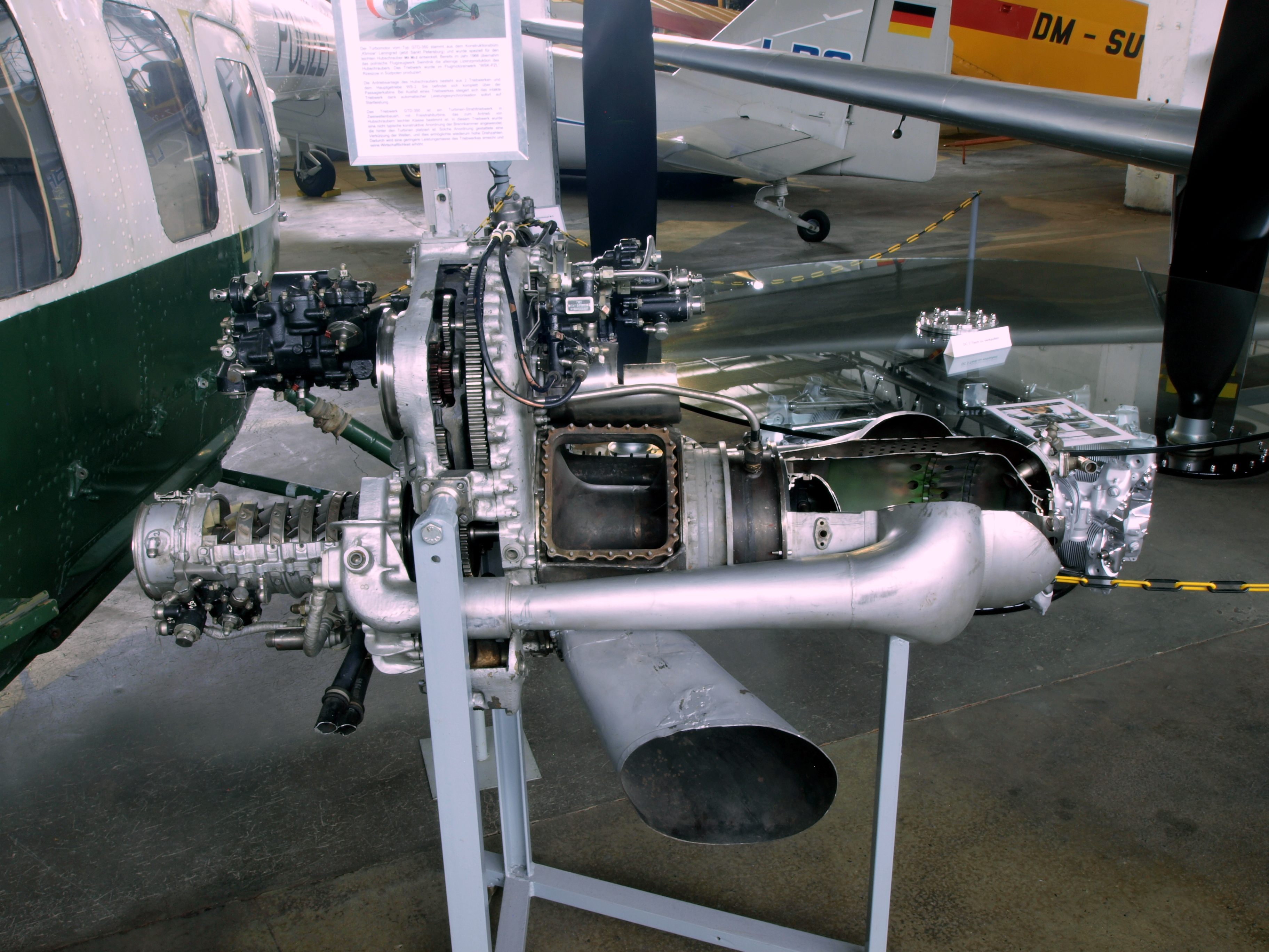 GTD-350 Mil Mi-2 helicopter engine.